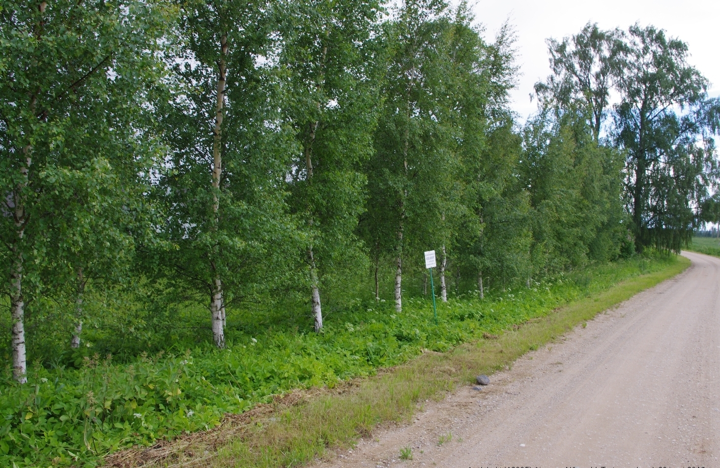 Asulakoht